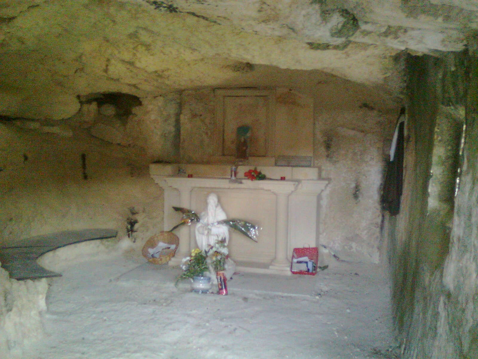 interno della grotta presso Noto dove San Corrado Confalonieri si ritirava per pregare e dormire